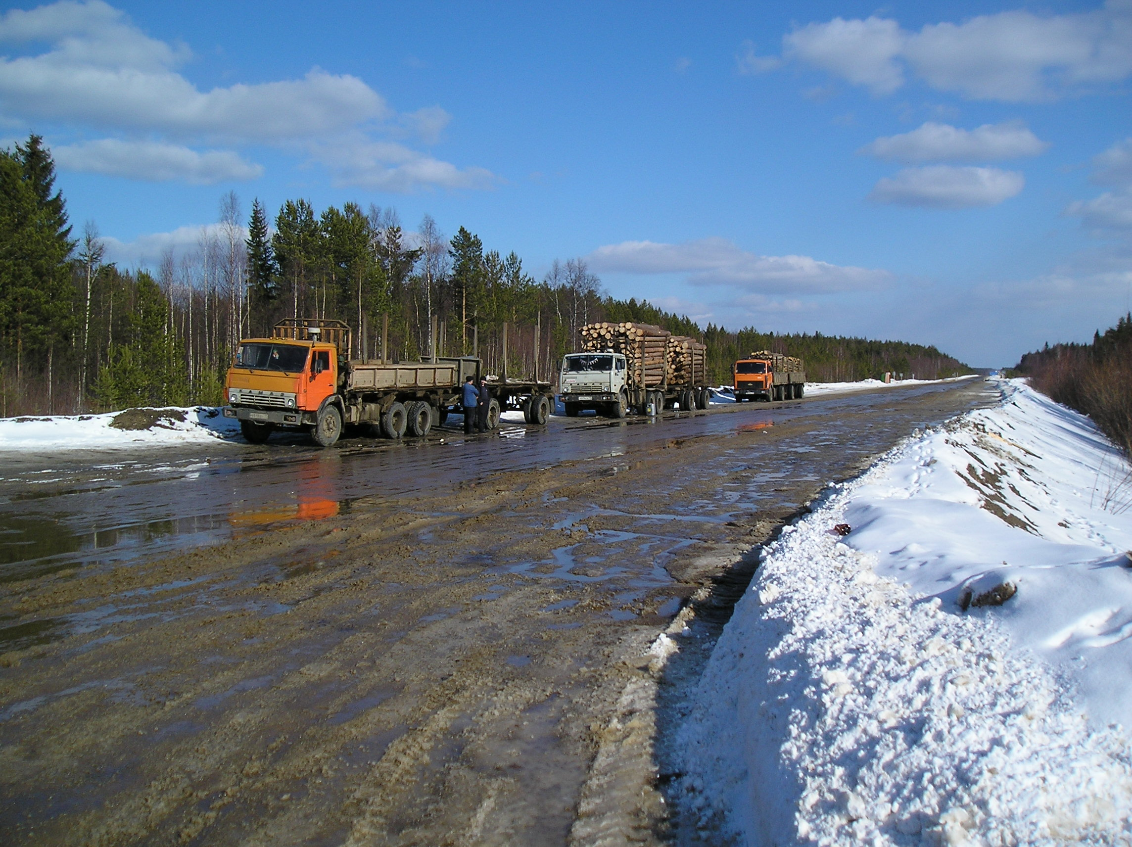 Лесовозы. Респ.Коми